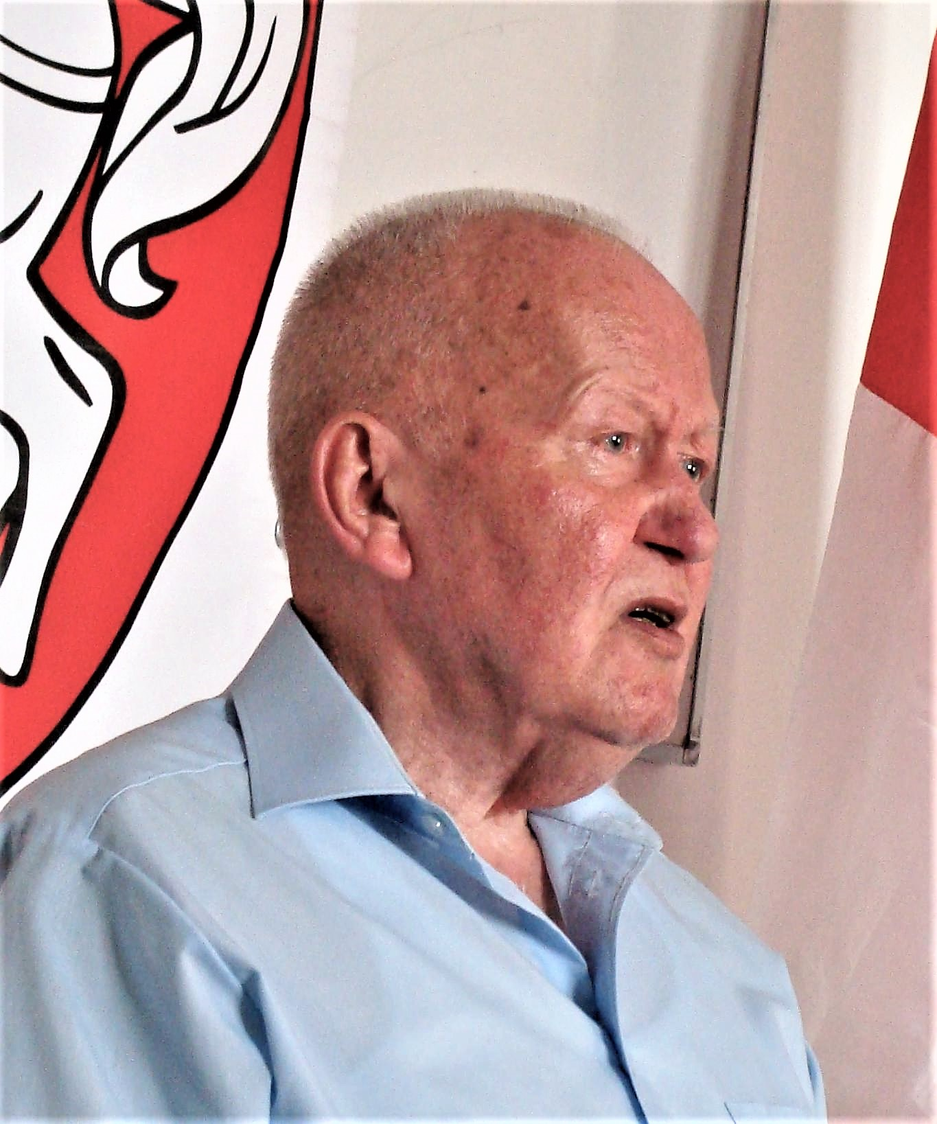 Jerzy Turonek, polski historyk białoruskiego pochodzenia, w czasie wykładu nt. Związku Białoruskiej Młodzieży w Pałacu Kultury i Nauki, Warszawa 11 czerwca 2010 roku.